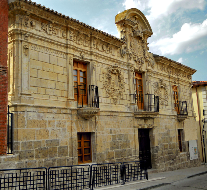 Hospital de Santo Tomás de Baltanás